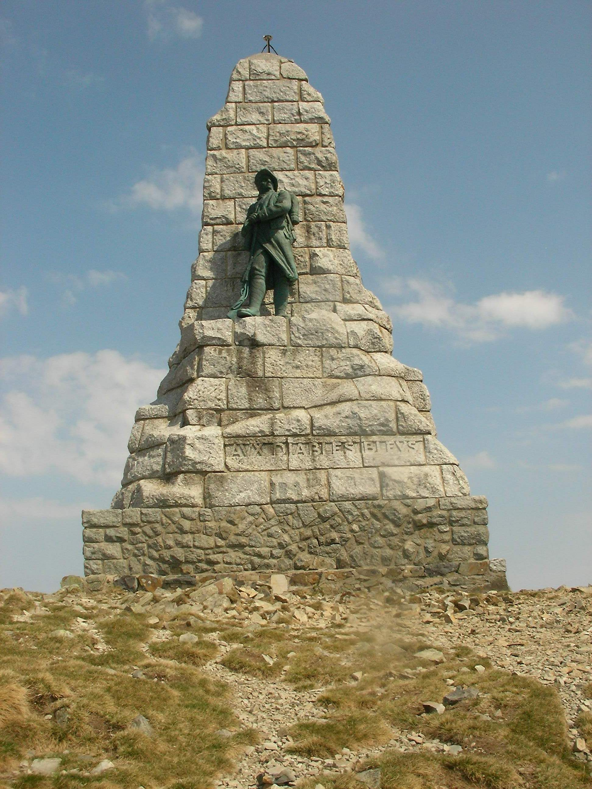 Monument Aux Diables Bleus au Grand Ballon à Soultz-Haut-Rhin (Haut-Rhin, France).